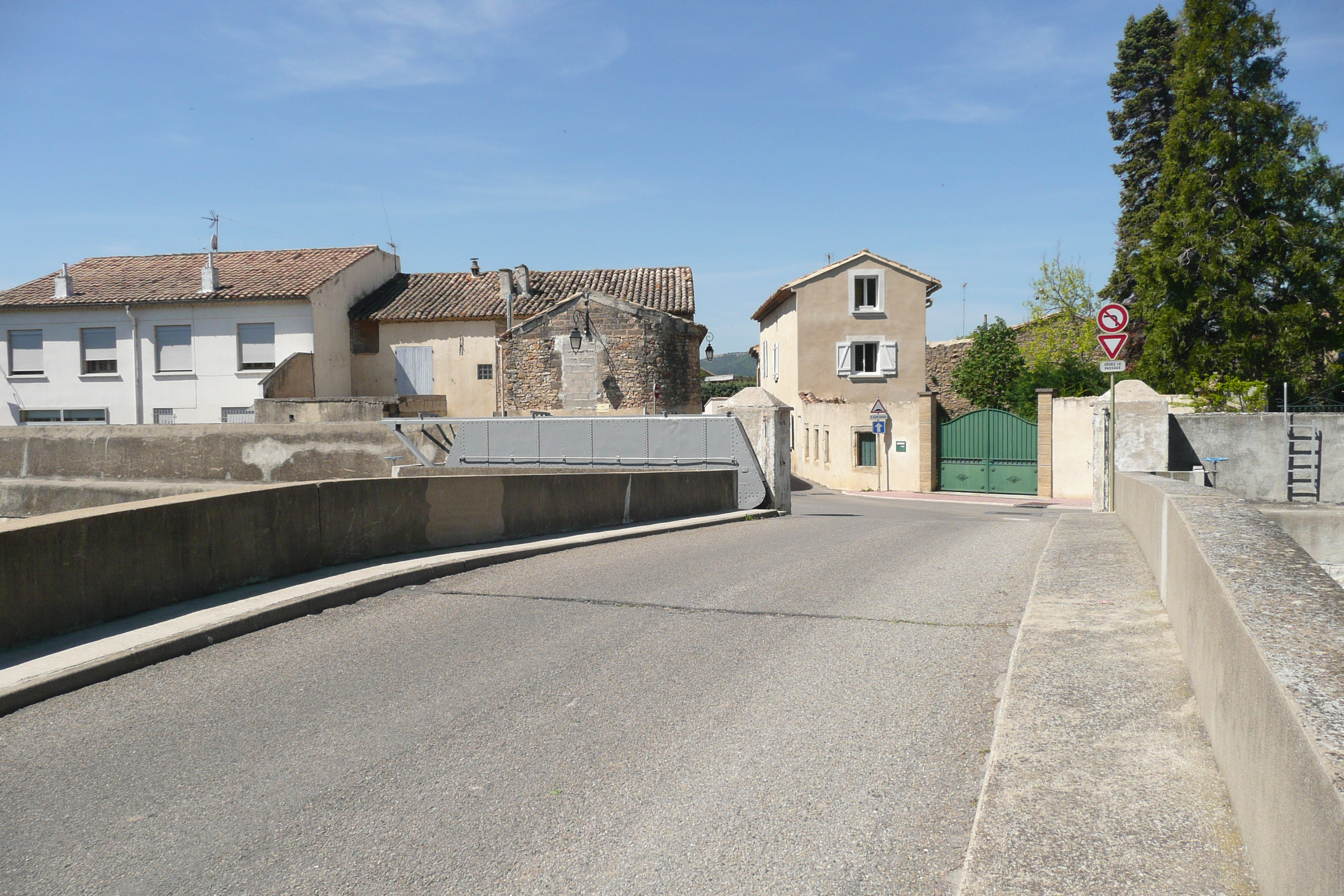 Codolet.